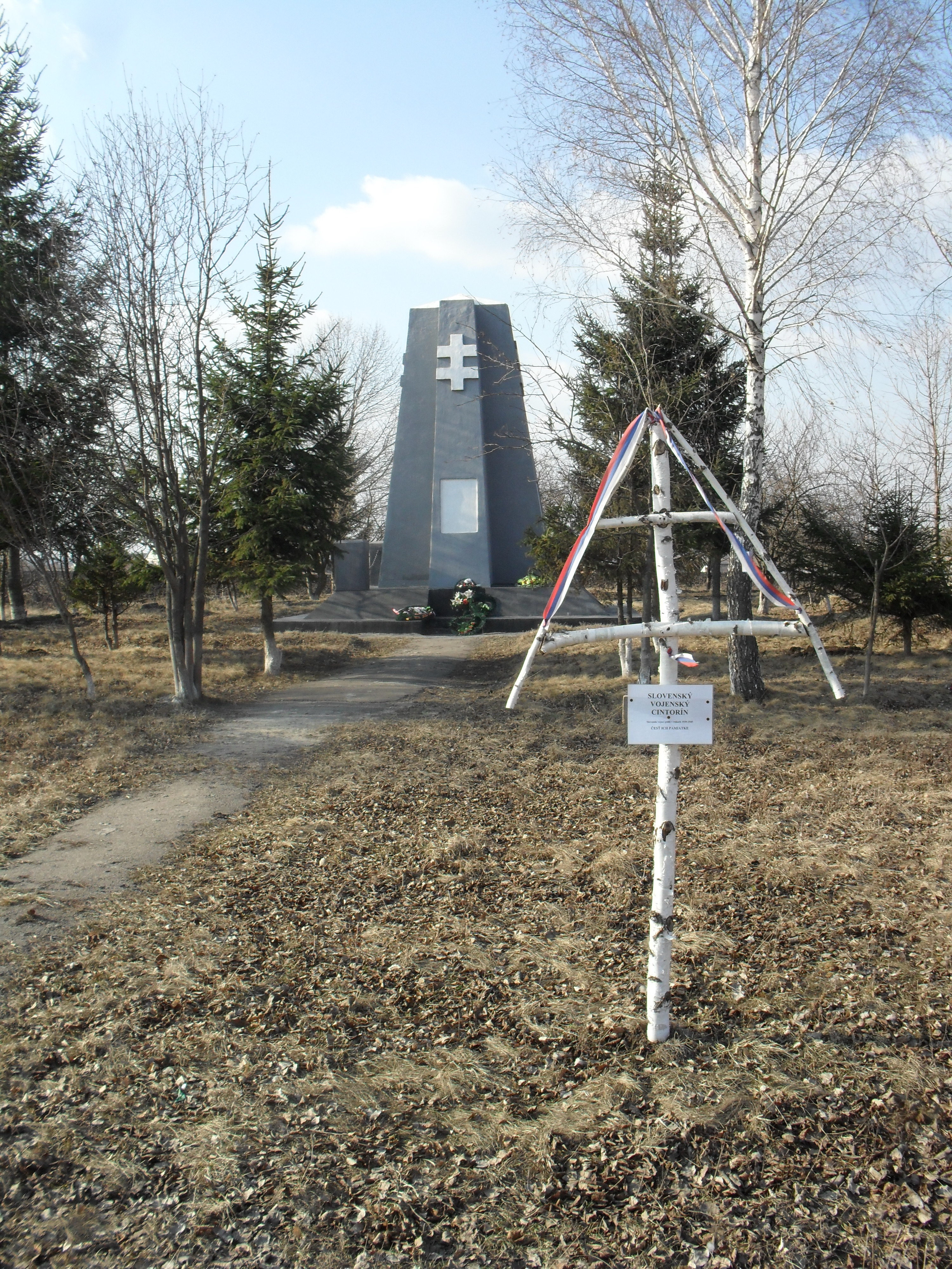 Словацький монумент під Липівцем